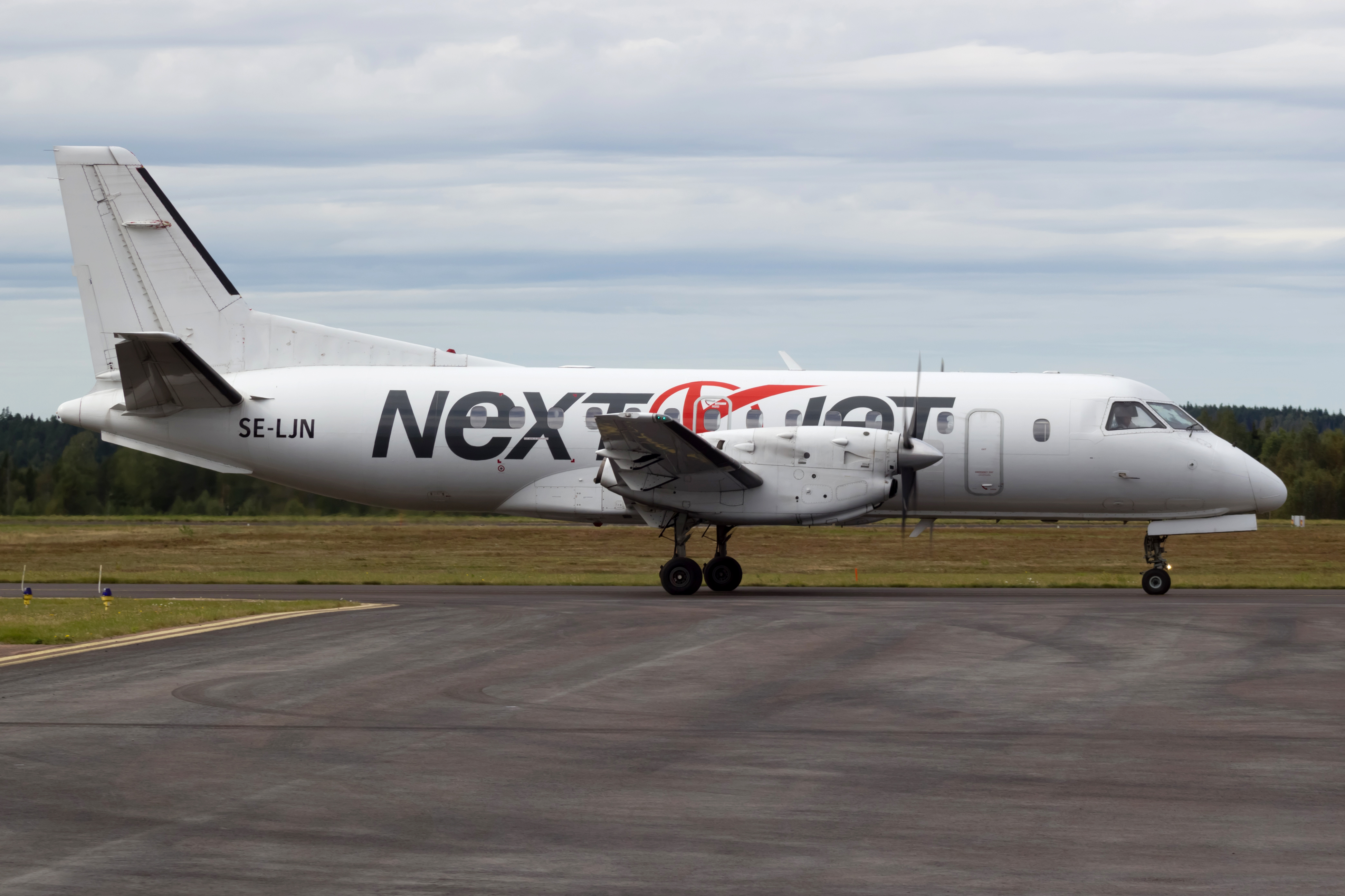 Saab 340 de Nextjet tras aterrar no aeroporto de Karlstad.